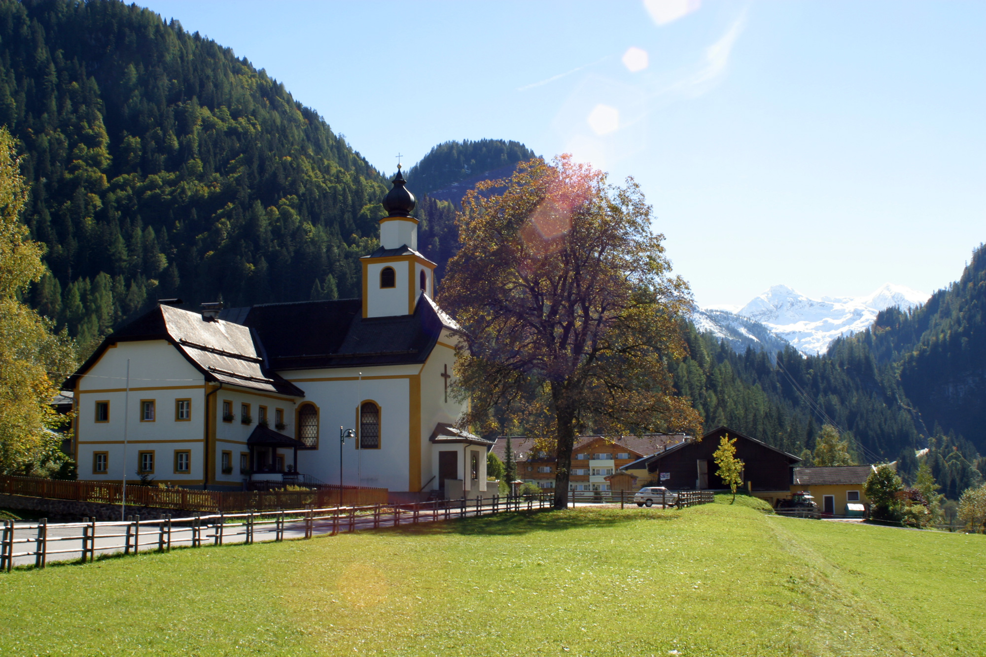 Kirche St. Peter in Untertauern